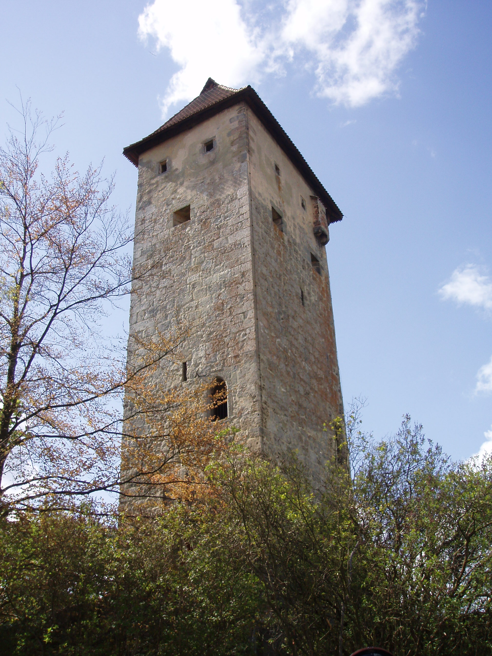 Burg Veldenstein, Bergfried